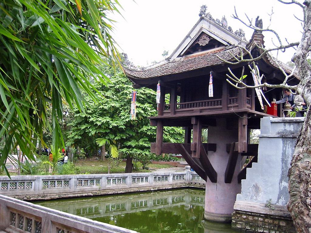 »One Pillar Pagoda« in Hanoi, Vietnam